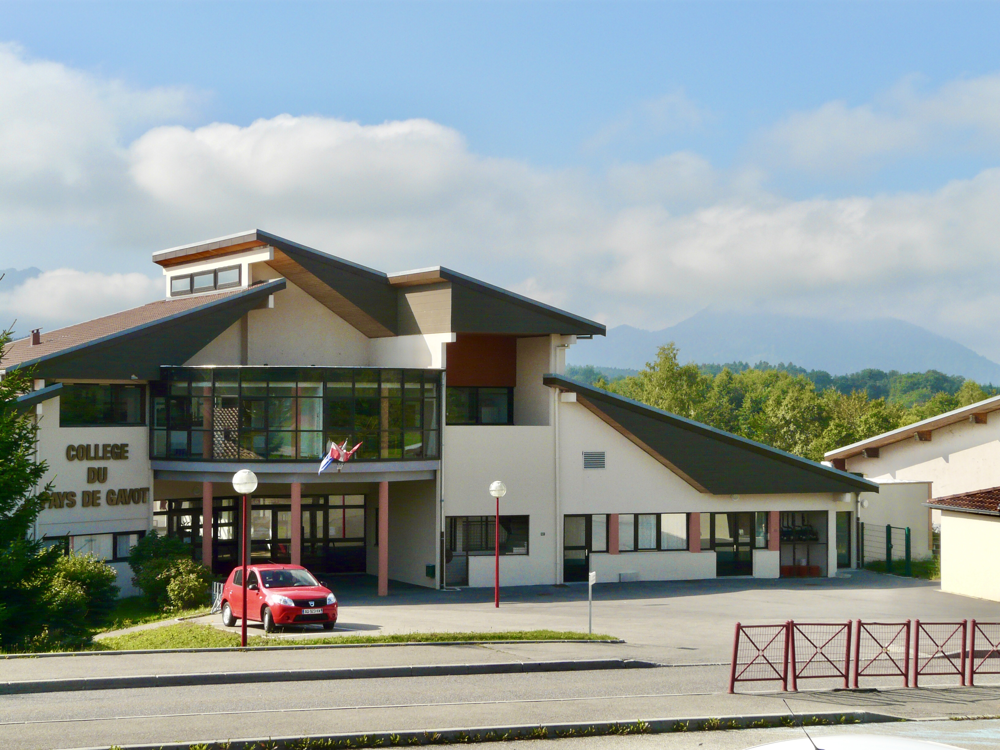 Collège du Pays de Gavot à Saint-Paul-en-Chablais